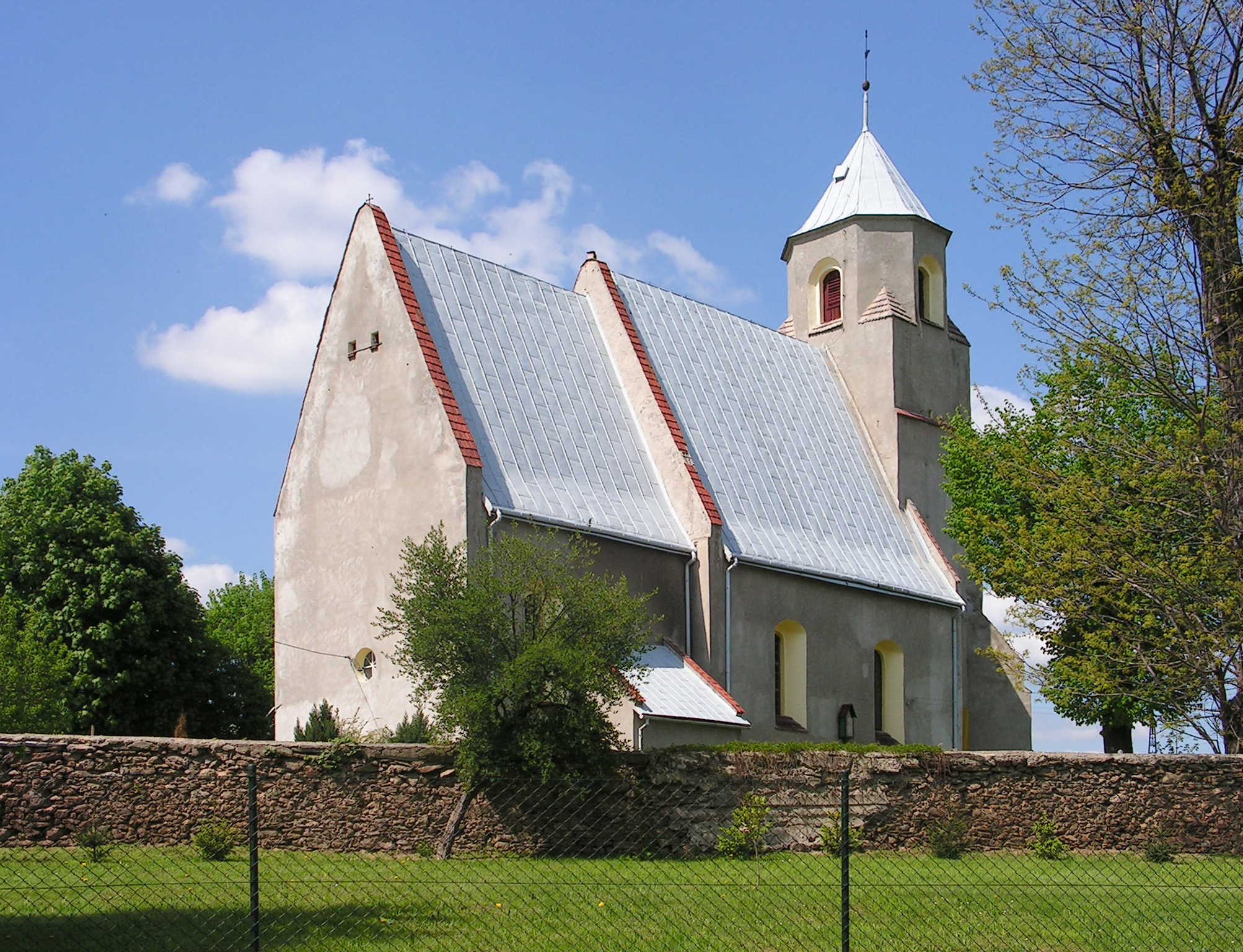 Owiesno kościół filialny p.w. św. Trójcy (zabytek nr rejestr. A/1705/803)